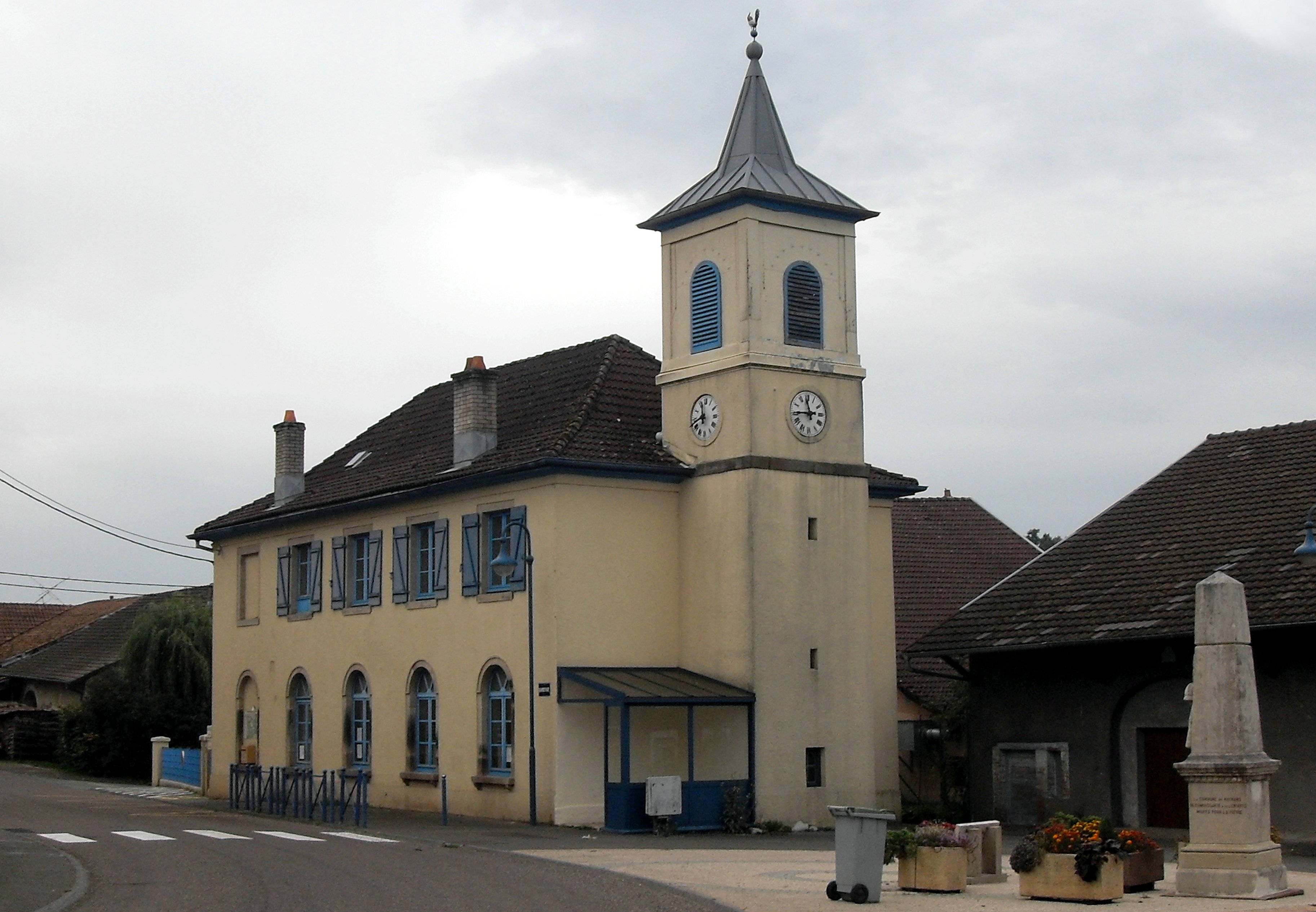 L'ancienne temple mennonite de Raynans - Aujourd'hui, l'école primaire